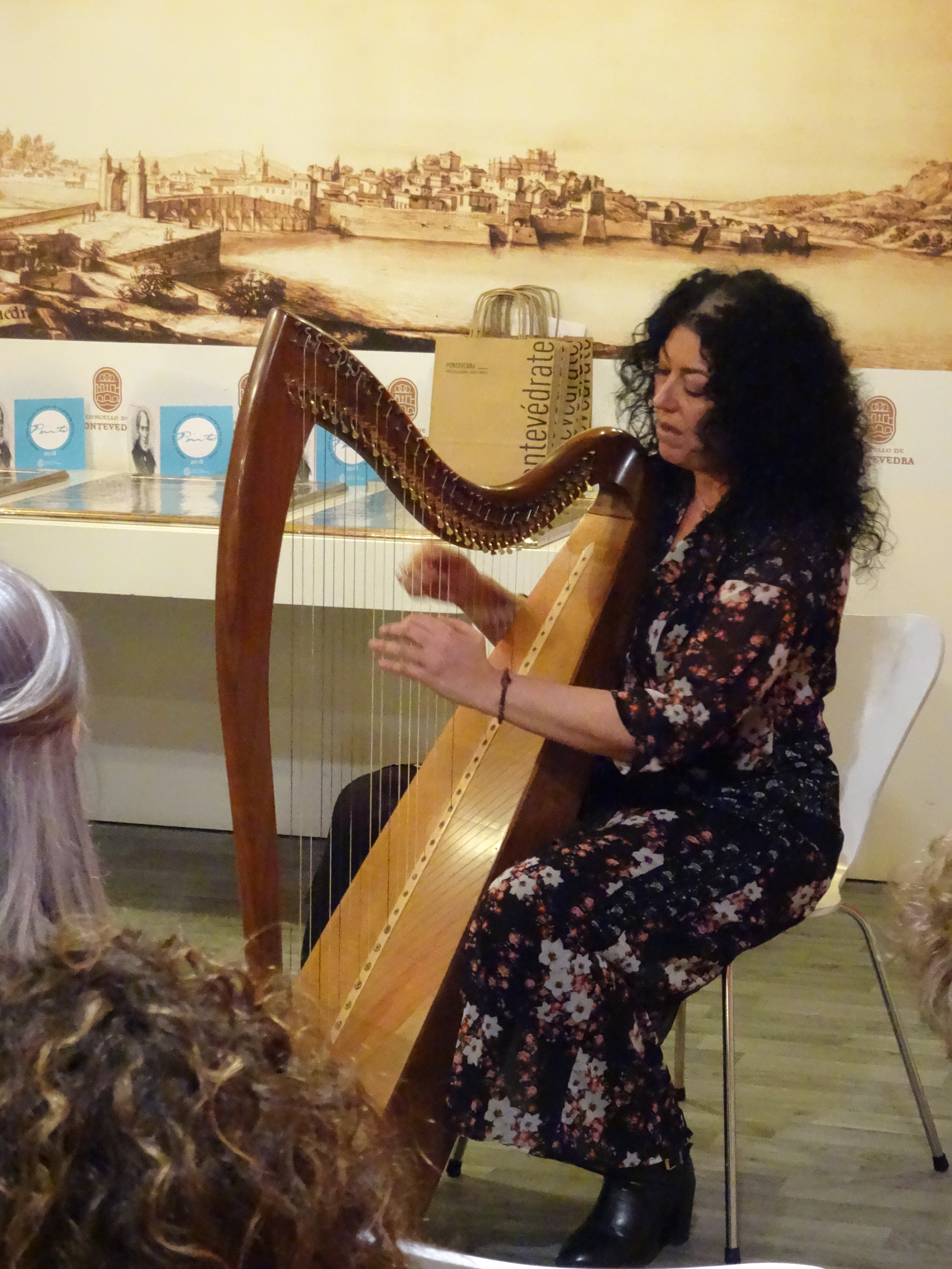 Actuación musical de Clara Pino e Pablo Vidal na entrega dos premios Xoán Manuel Pintos do 2018.